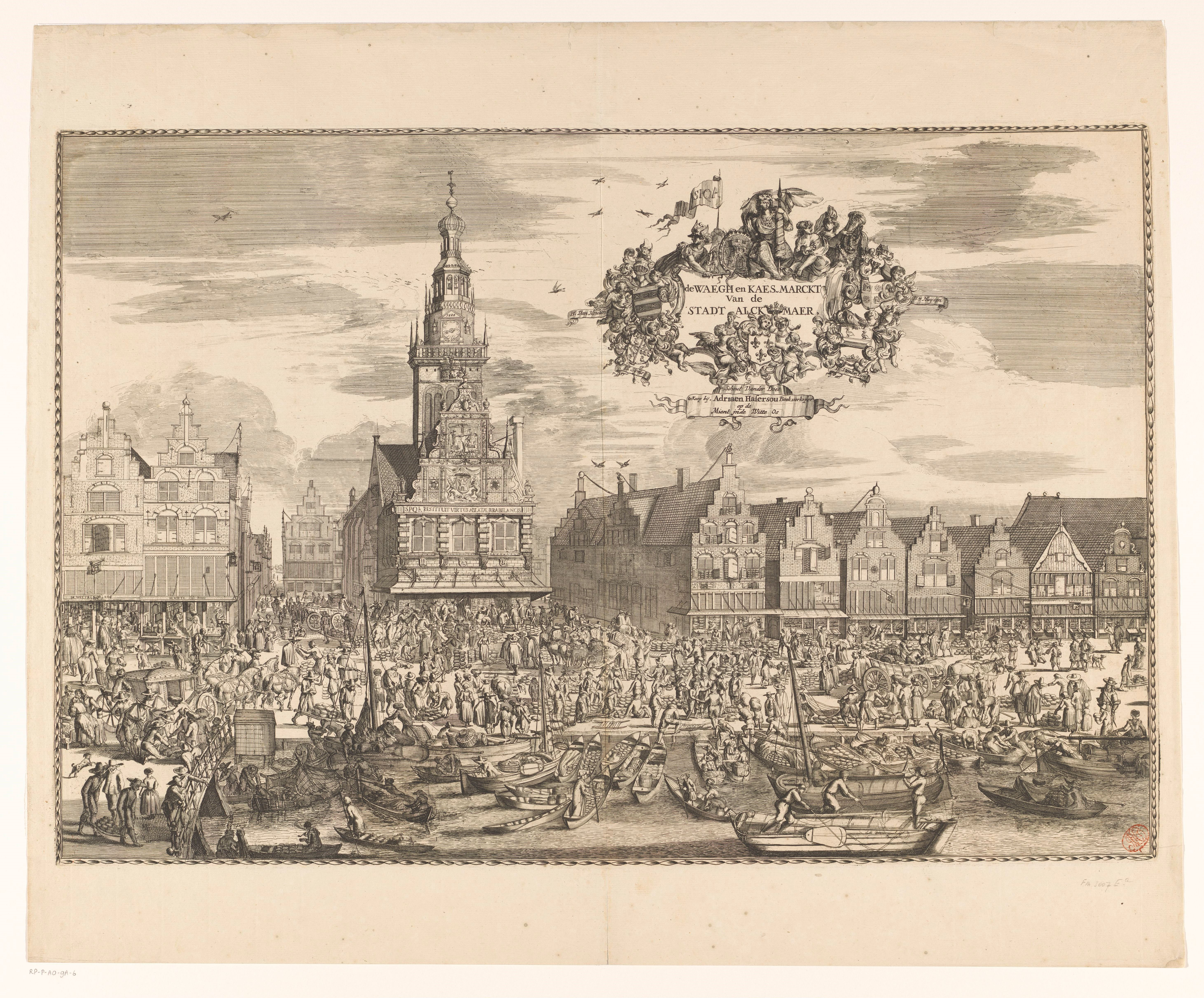 IdentificatieTitel(s): Waag en Kaasmarkt te Alkmaar, 1674De Waegh en Kaes-Marckt van de stadt Alckmaer (titel op object)Objecttype: prent Objectnummer: RP-P-AO-9A-6Catalogusreferentie: Aantal staten bekend-2(2)FMH 3007-EaHollstein Dutch 255Opmerking: Hollstein geeft geen staten, dit is 2(2), de voltooide staatOpschriften / Merken: verzamelaarsmerk, recto rechtsonder, gestempeld: Lugt 195Omschrijving: Gezicht op de Waag en de Kaasmarkt te Alkmaar, 1674. Links twee huizen aan de Mient: De Witte Os (de boekwinkel en uitgeverij van Adriaen Hafersou) met daarnaast De Witte Roos. Rechtsboven een grote cartouche met allegorische figuren, het wapen van Alkmaar en de wapens van vier burgemeesters en de schout van de stad.VervaardigingVervaardiger: prentmaker: Romeyn de Hooghe (toegeschreven aan)prentmaker: anoniemuitgever: Adriaen Hasersou (vermeld op object)Plaats vervaardiging: prentmaker: Noordelijke Nederlandenprentmaker: Noordelijke Nederlandenuitgever: AlkmaarDatering: 1674 en/of 1690 - 1710Fysieke kenmerken: ets en gravureMateriaal: papier Techniek: etsen / graveren (drukprocedé)Afmetingen: plaatrand: h 422 mm × b 632 mmOnderwerpWat: marketcheeseweigh-housecoat of arms (as symbol of the state, etc.) (+ city; municipal)armorial bearing, heraldry (with NAME of family) - coat of armsWanneer: 1674 - 1710Waar: WaagAlkmaarVerwerving en rechtenVerwerving: overdracht van beheer 1887Copyright: Publiek domein